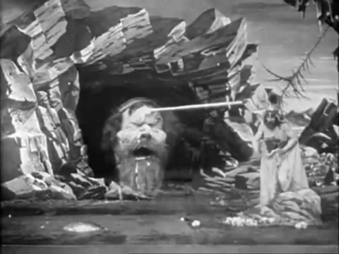 photo du film "L'Île de Calypso : Ulysse et le géant Polyphème" (Méliès, 1905)